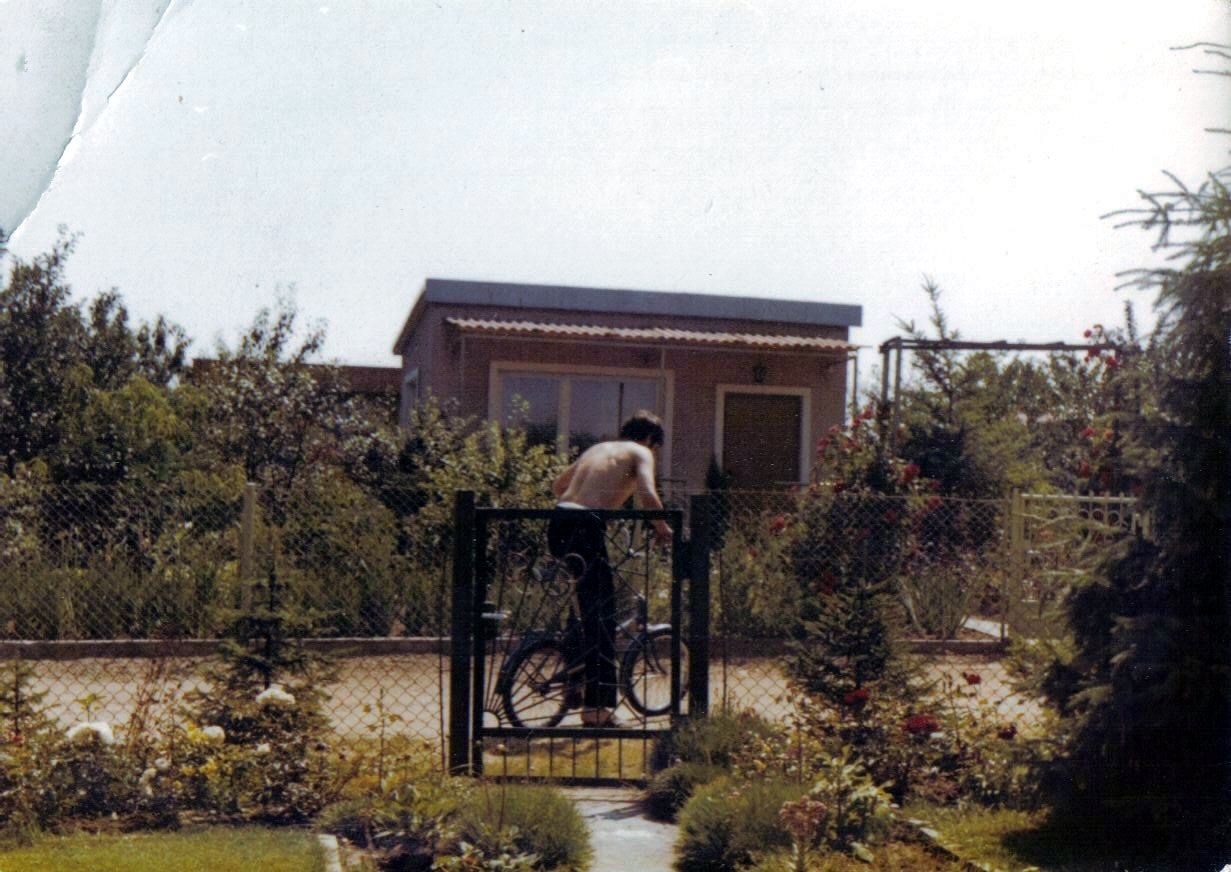 Allotment gardens in Kierszek, Poland